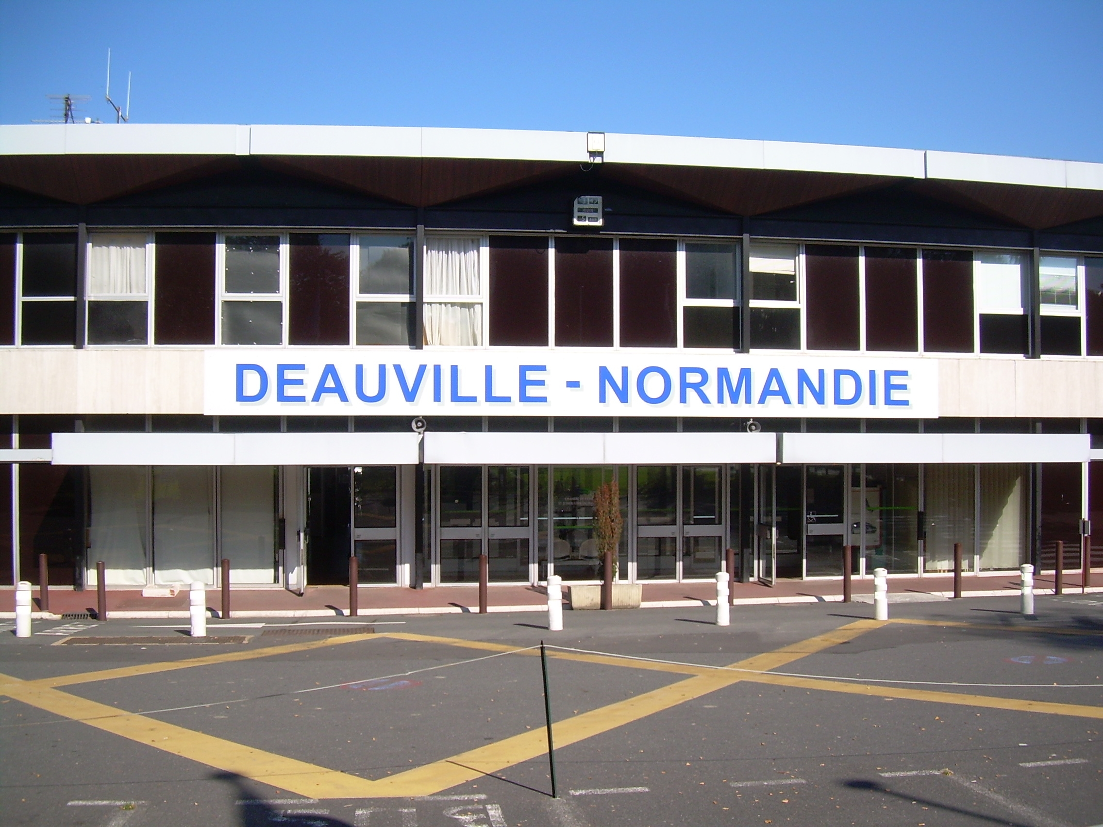 Façade de l'aérogare de Deauville avec le nouveau nom.